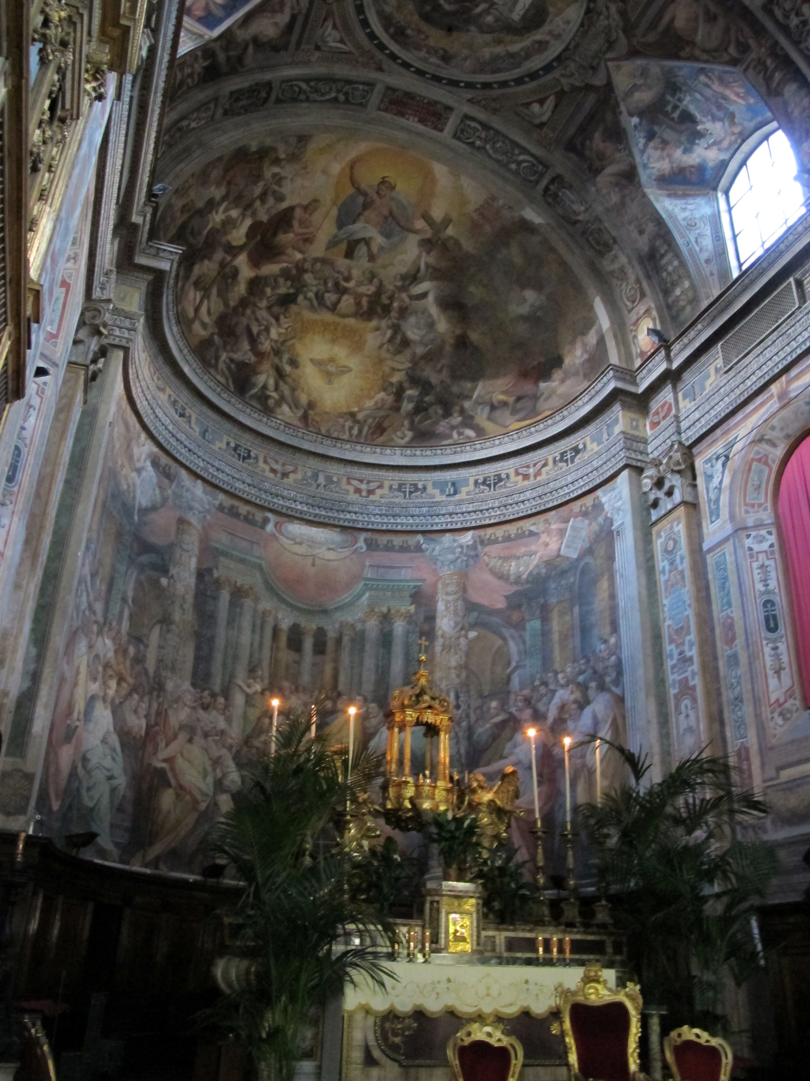 Santo Spirito in Saxia, Roma